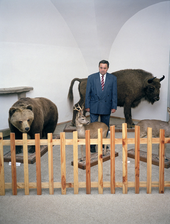 Fotografie z cyklu Unofficial, ve kterém popisovala život na Slovensku po pádu komunismu Fotografie z cyklu Unofficial, ve kterém popisovala život na Slovensku po pádu komunismu